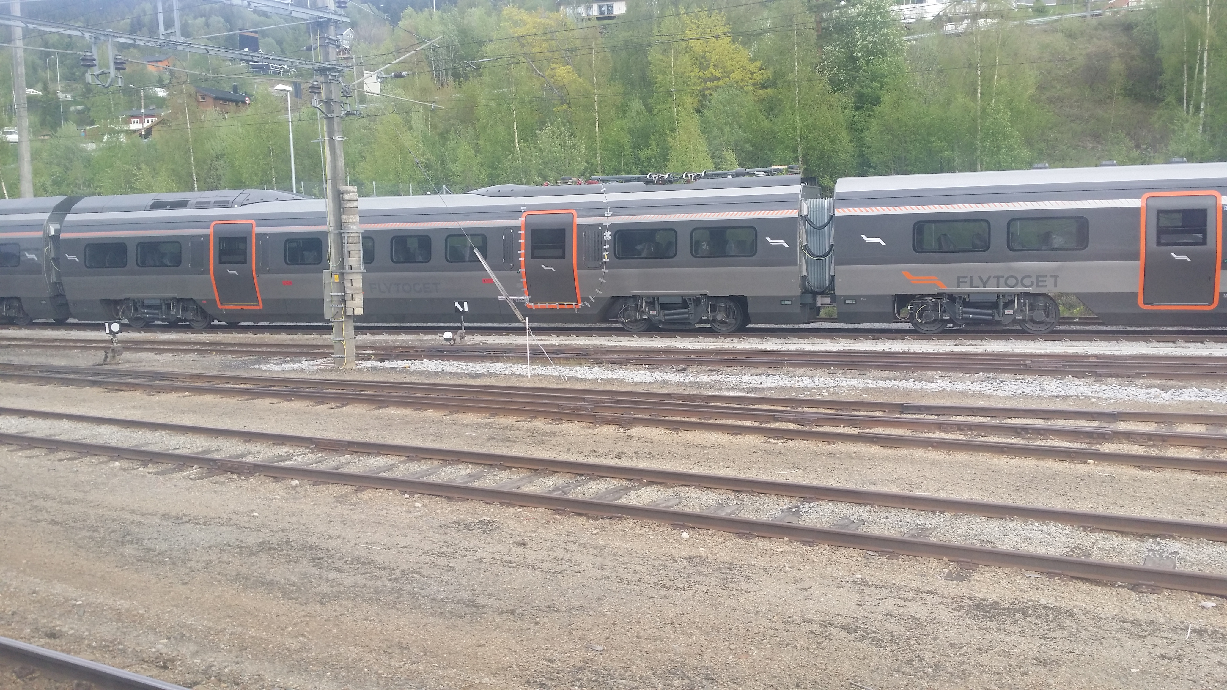 Mellomvogn til flytogsett type 78.